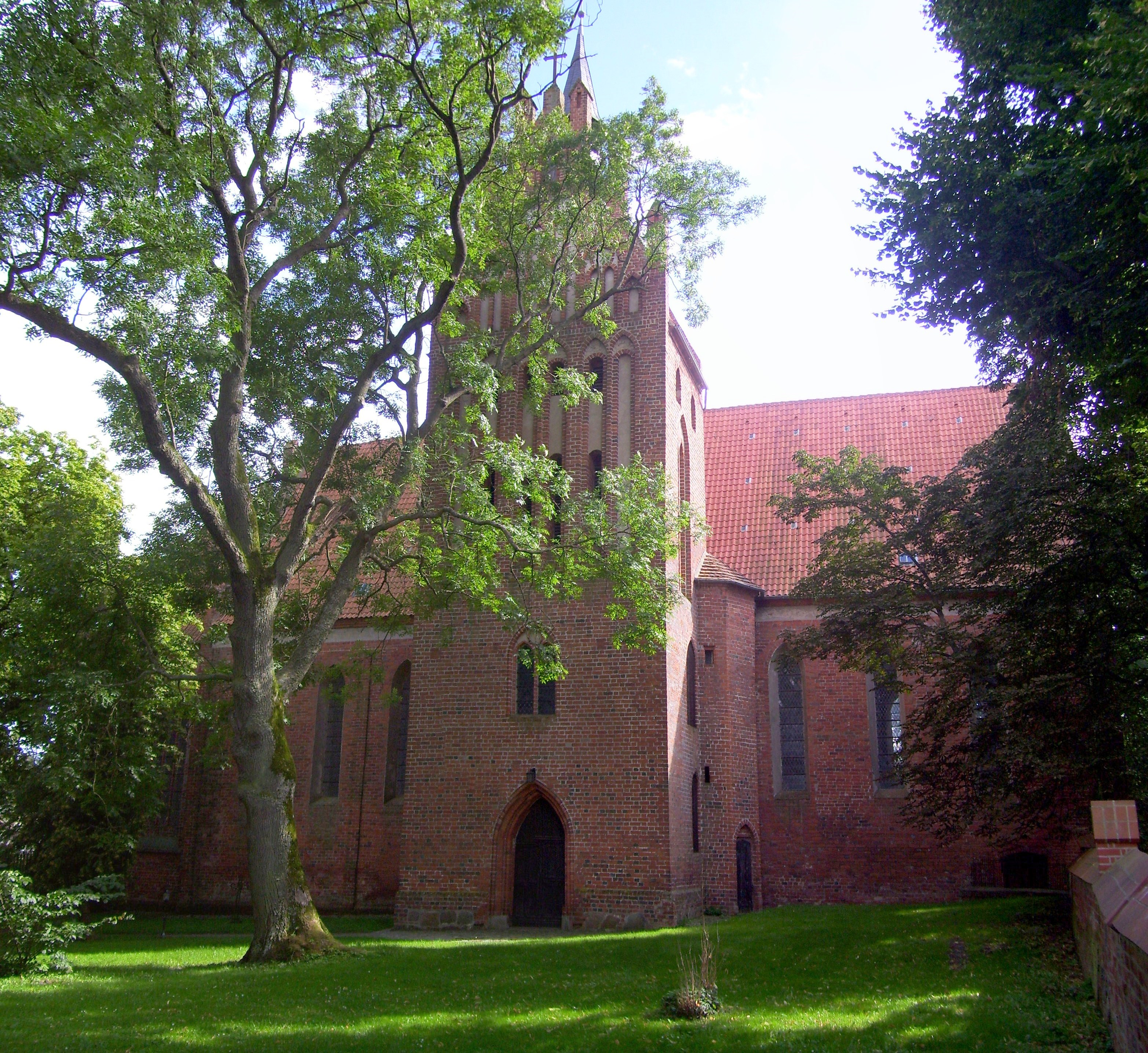 Klosterkirche Verchen, Nordseite mit Turm